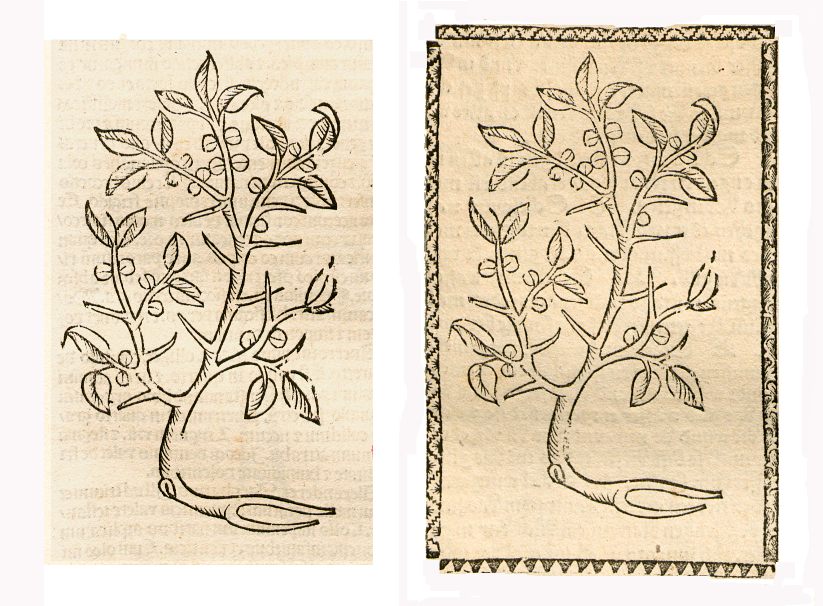 Abbildung vonː Schlehen, unzitig (Prunus spinosa)